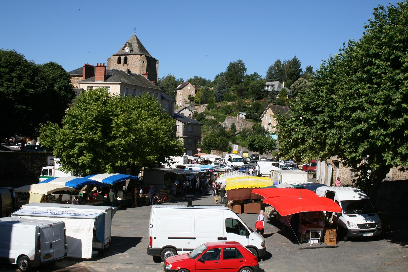 Cassagnes-Begonhès (France)- Jour de marché